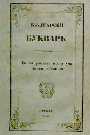 Корица на Български буквар на Георги Бусилин.